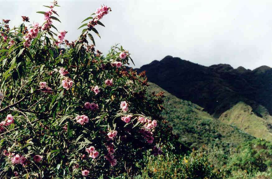 Tarasa Mandonii (Malvaceae) Huichupata, Purani Churiquimbaya (3000m), Sorata (Larecaja, Bolivie).